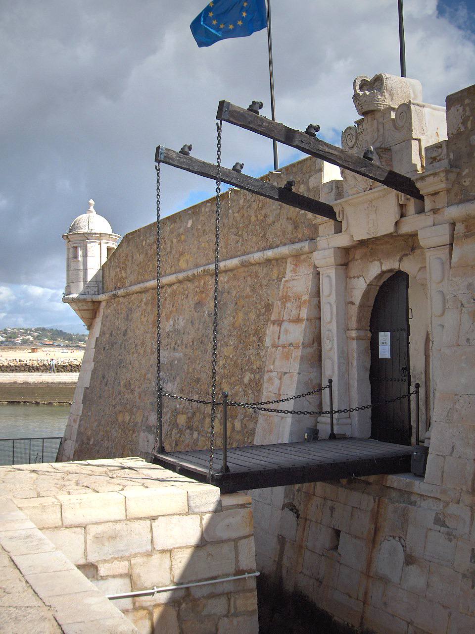 Entrance with drawbridge; Forte da Ponta da Bandeira; Lagos, Portugal